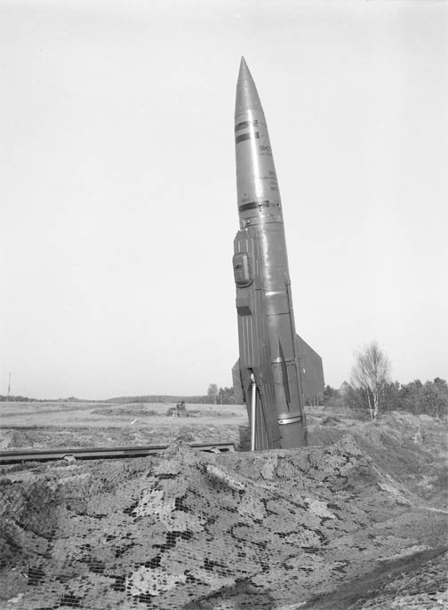 pierwszy start Toczki w WP